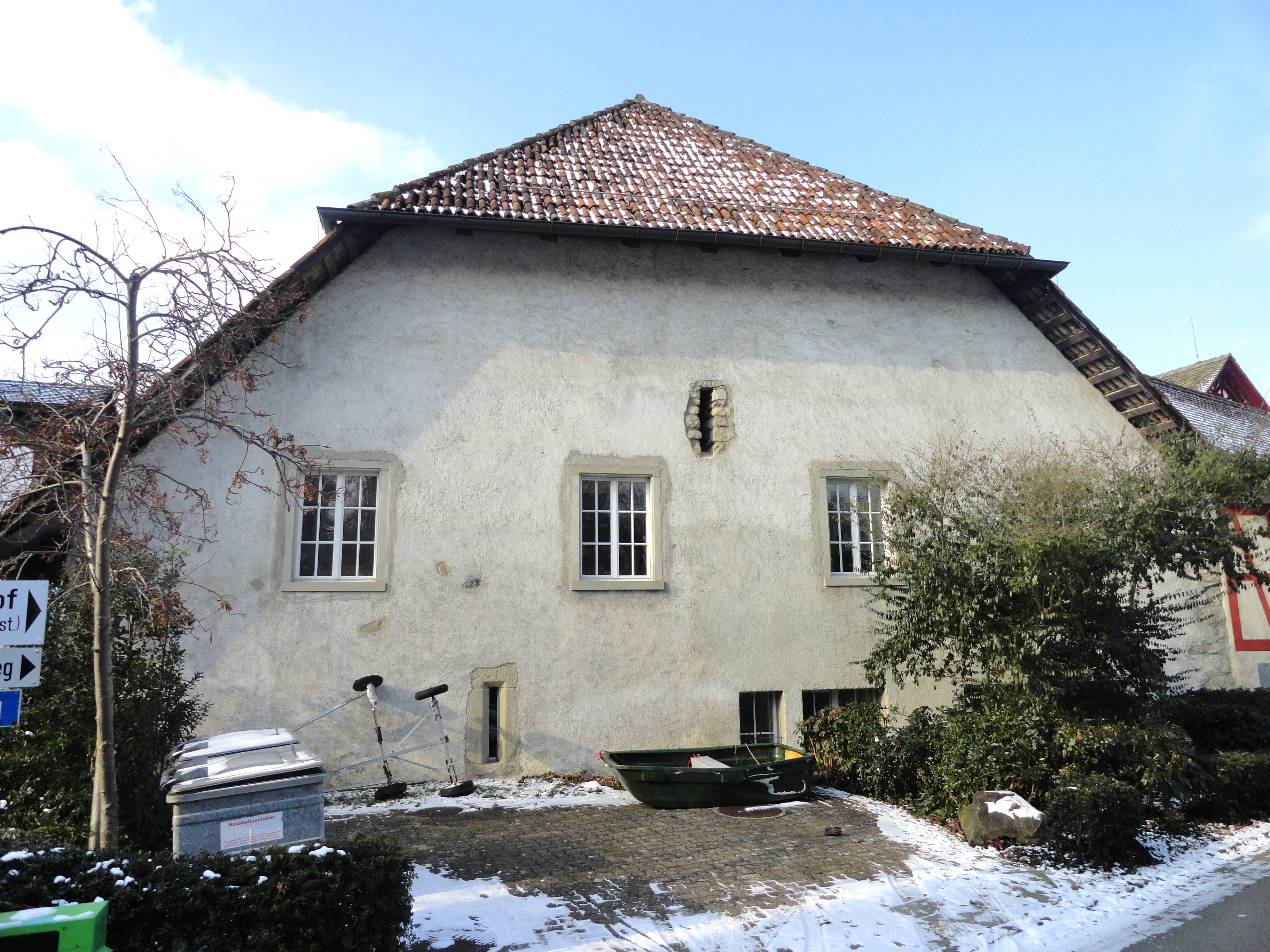 Zehnentrotte Ostseite